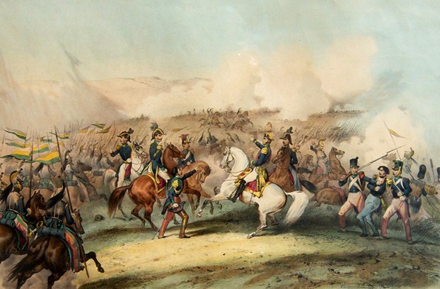 Bataille d'Ingavi. 1841. Gravure du milieu du XIXème siècle.